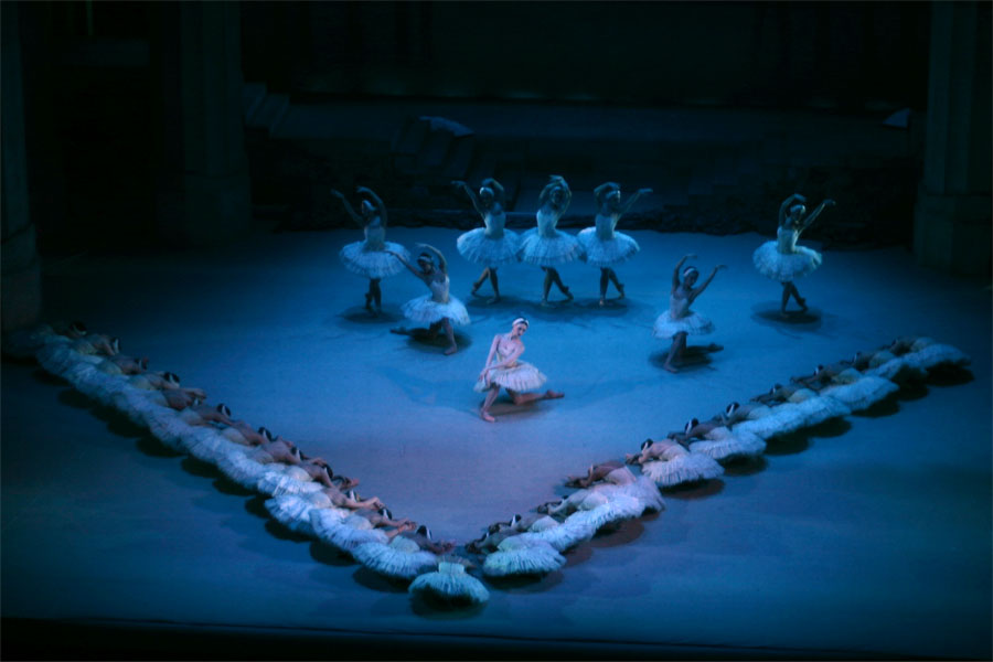 Szene aus Ballett Schwanensee (3. Akt) am 8.10.2004 in der Wiener Staatsoper Besetzung: Odette: Simona Noja. Choreographie: Rudolf Nurejew nach Marius Petipa. Bühnenbild und Kostüme: Jordi Roig. Choreographische Einstudierung: Richard Nowotny.